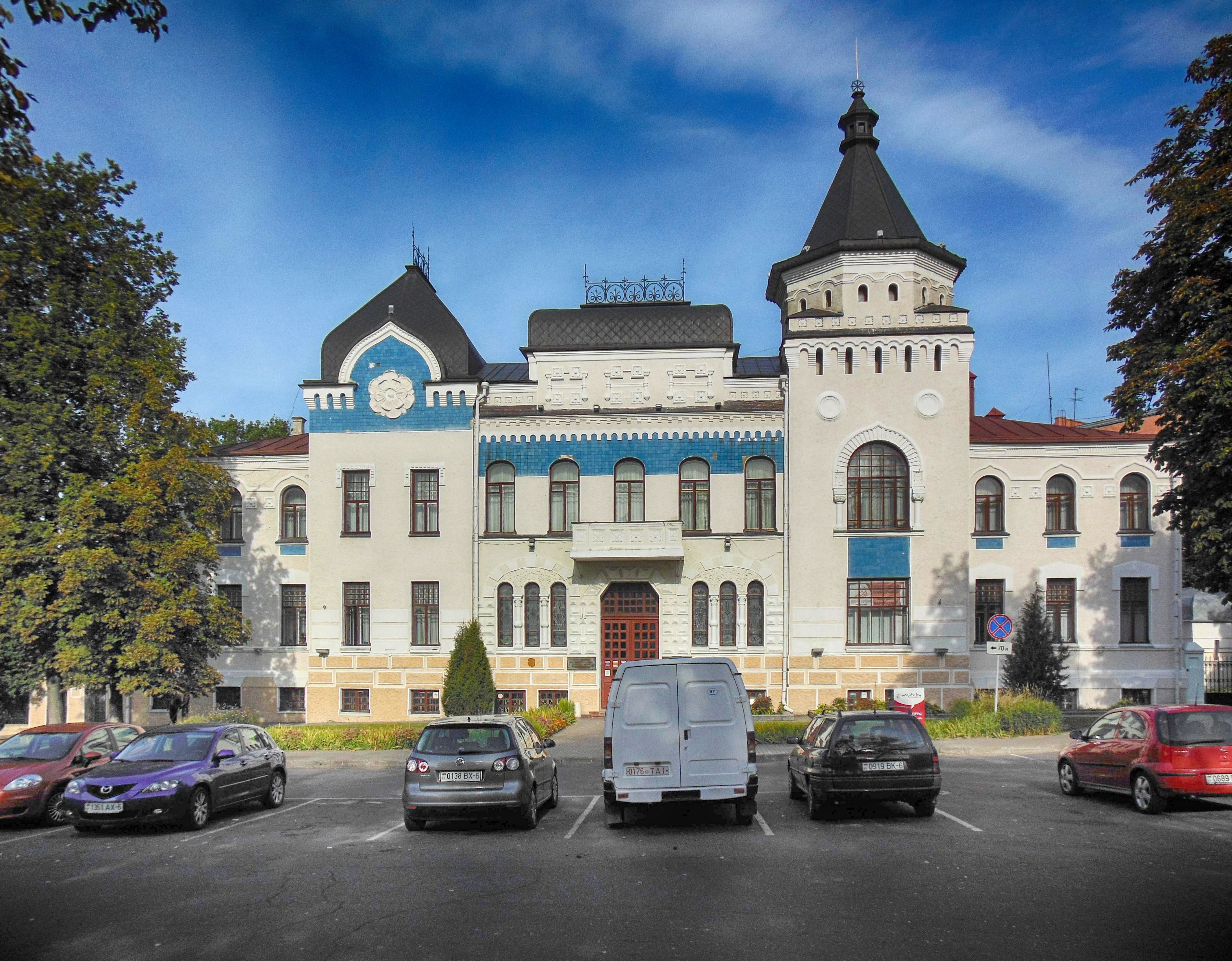 Беларуская (тарашкевіца): Будынак былога сялянскага пазямельнага банка. г. Магілёў This is a photo of Belarusian heritage monument. Reference number: 513Г000034 ( WLM)